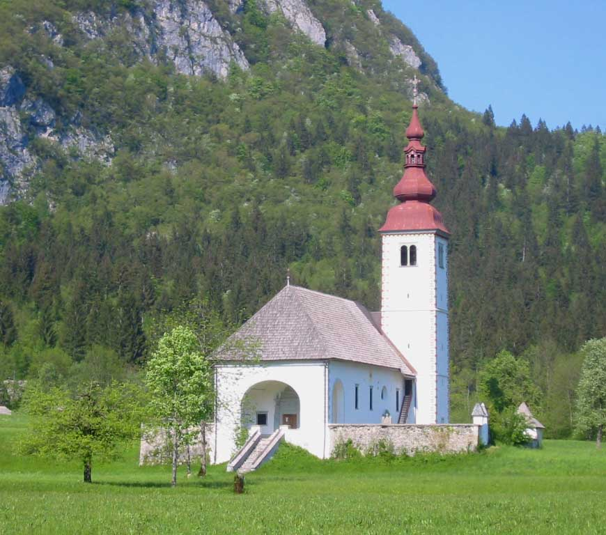 Church in Bitnje, near Bohinj lake, Slovenia photo:Ziga 10:33, 16 April 2007 (UTC)